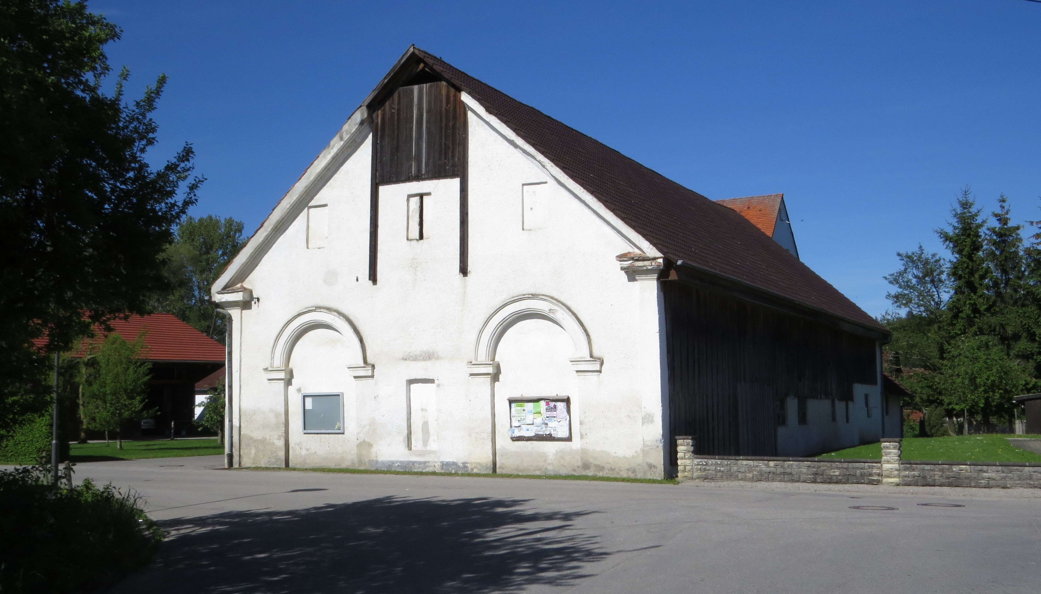 Nebengebäude Mühlenstr. 6 in Gernstall, Mindelheim